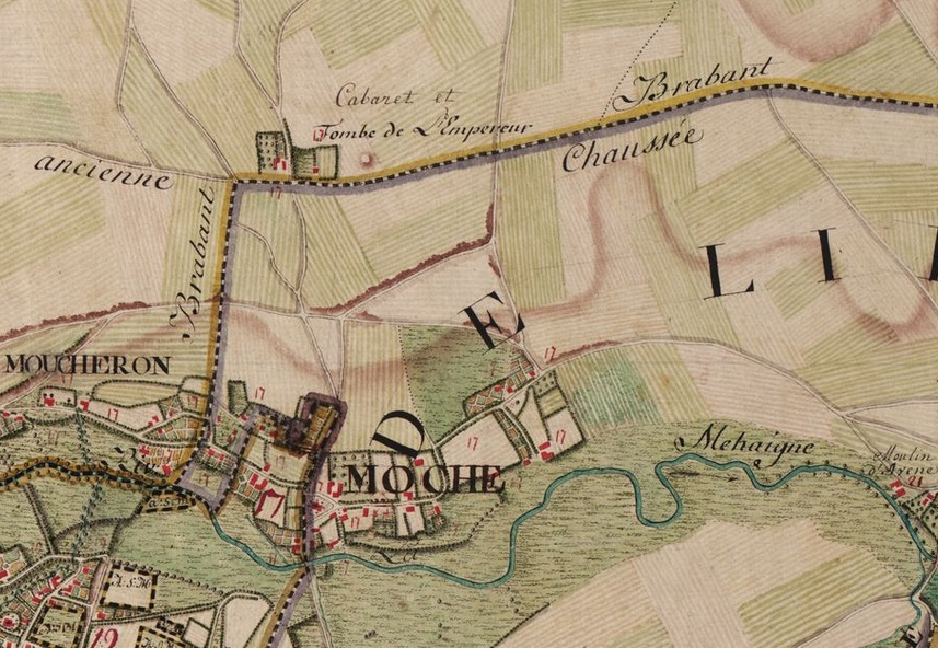 Extrait de la carte de Ferraris n° 134B